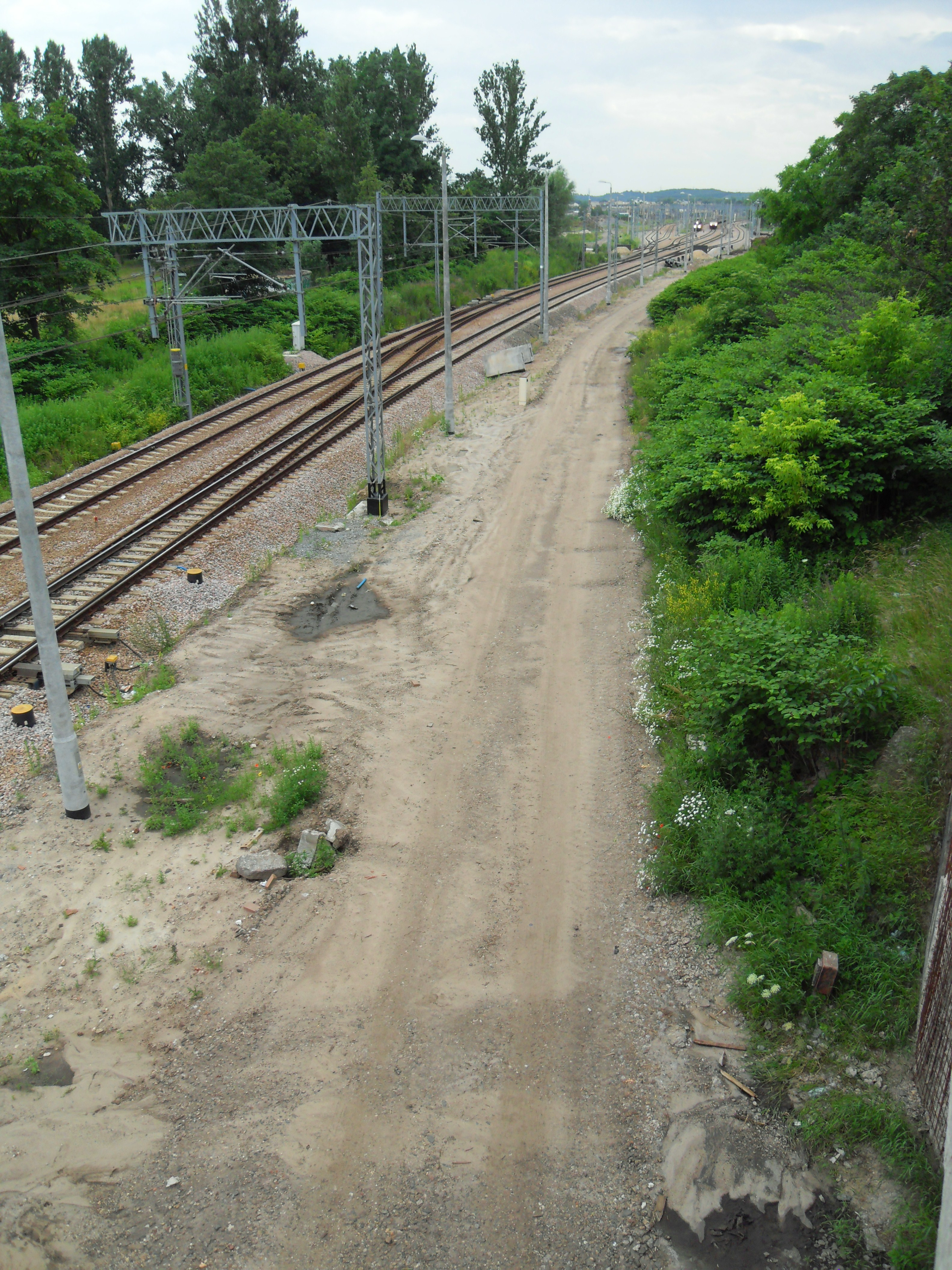 Gdańsk Zaroślak, dawny przystanek kolejowy Gdańsk Biskupia Górka.